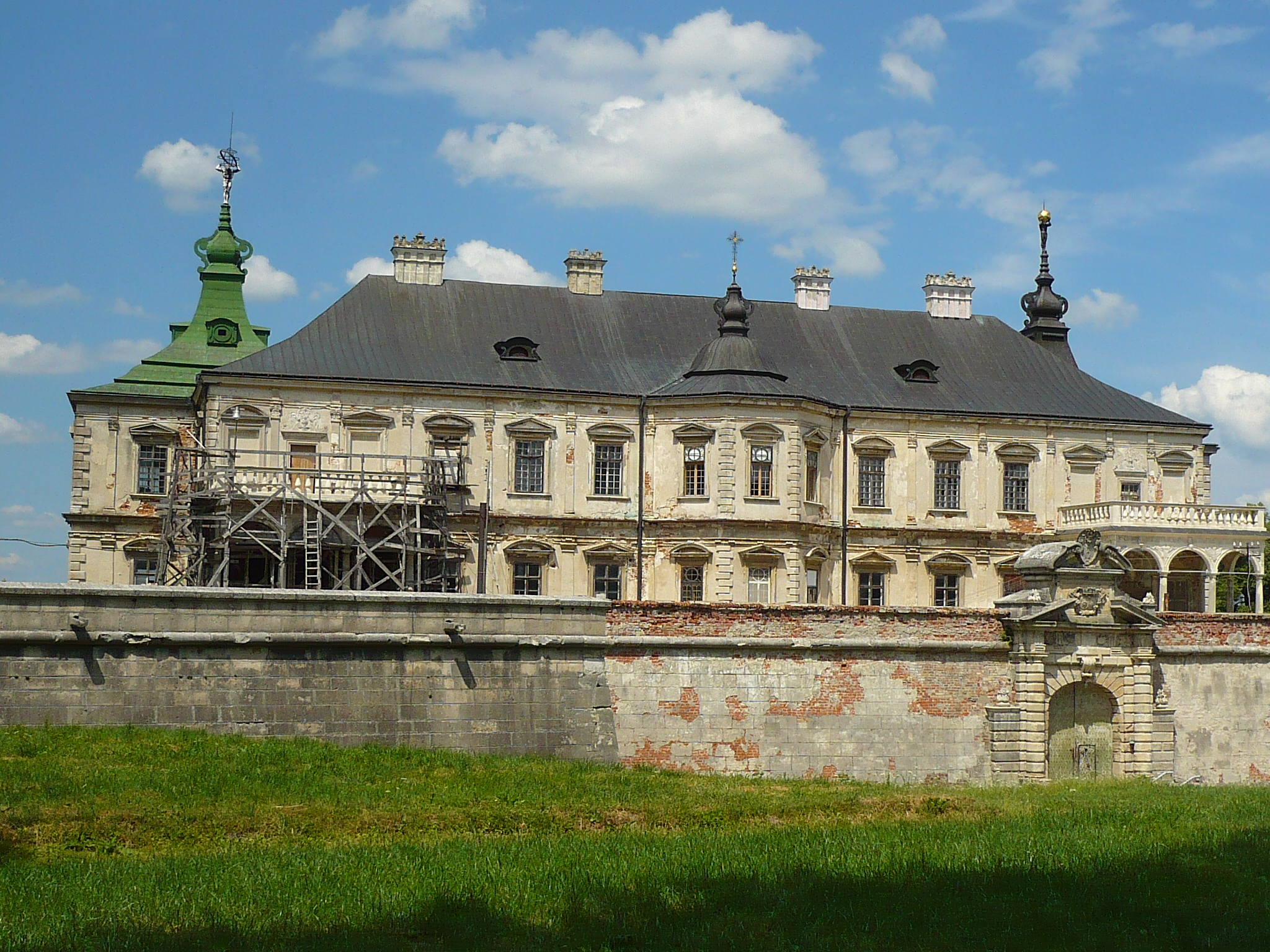 Zamek w Podhorcach